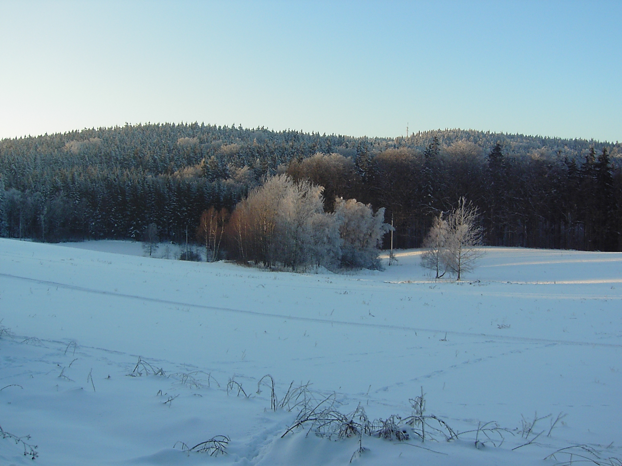 Tanečnice, Mikulášovice, pohled z tomášovské cesty